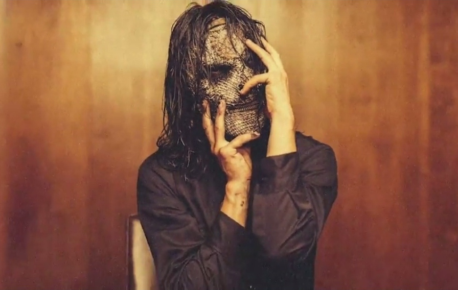 Jay Weingberg #1